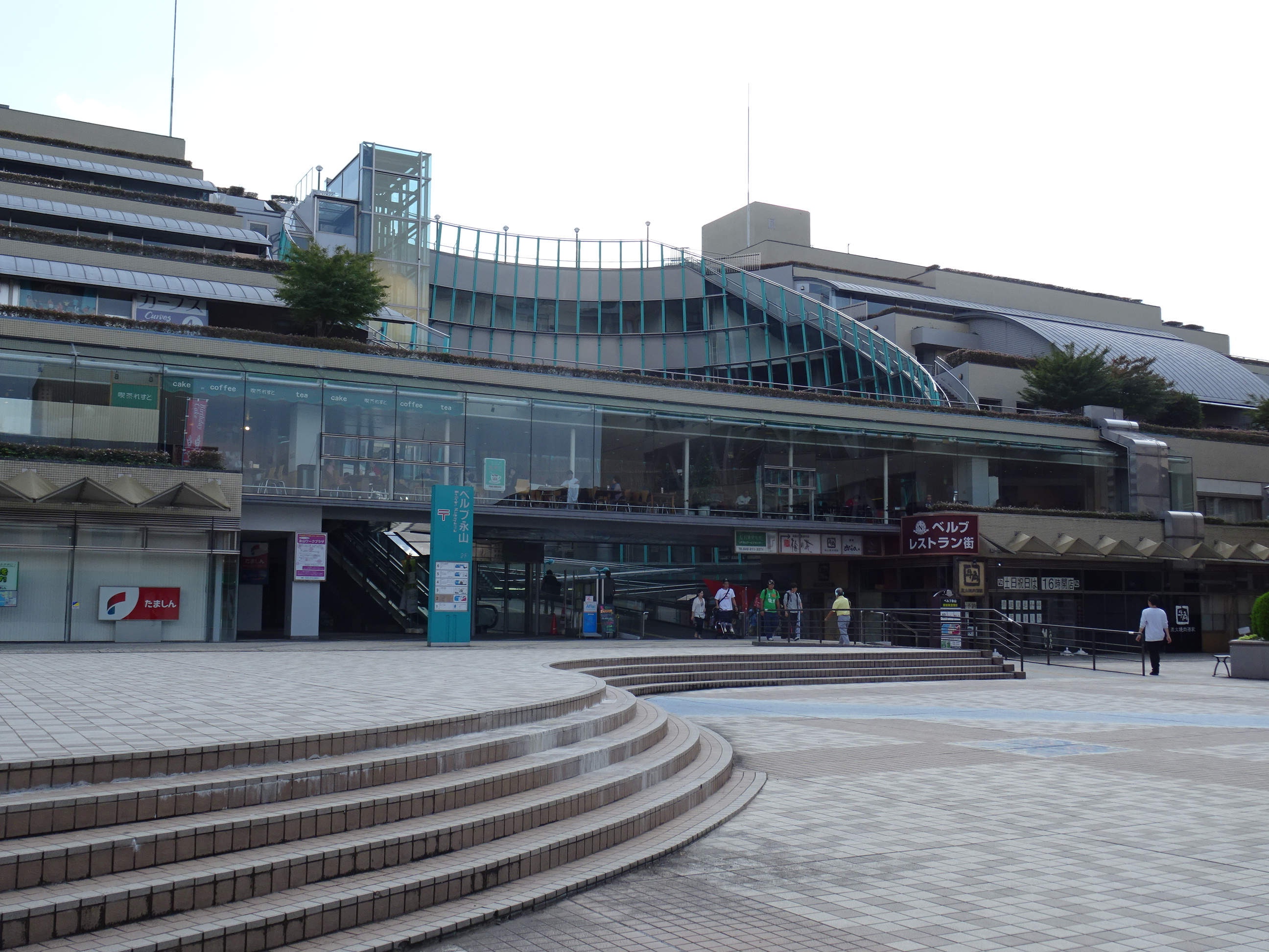 多摩市の施設「ベルブ永山」（2015/10/04撮影）